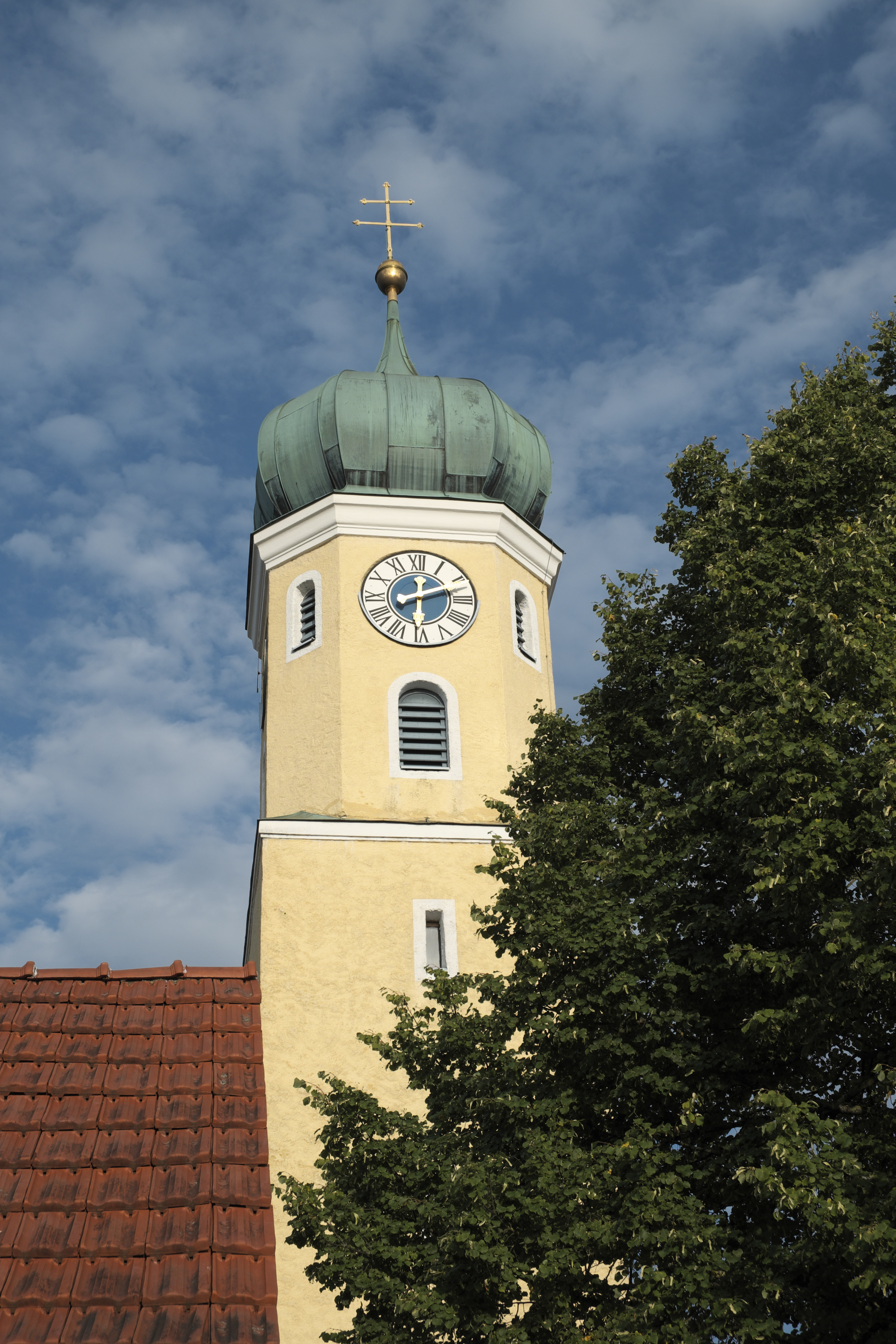 Katholische Pfarrkirche St. Laurentius in Haag an der Amper im Landkreis Freising (Bayern/Deutschland), Glockenturm mit Zwiebelhaube